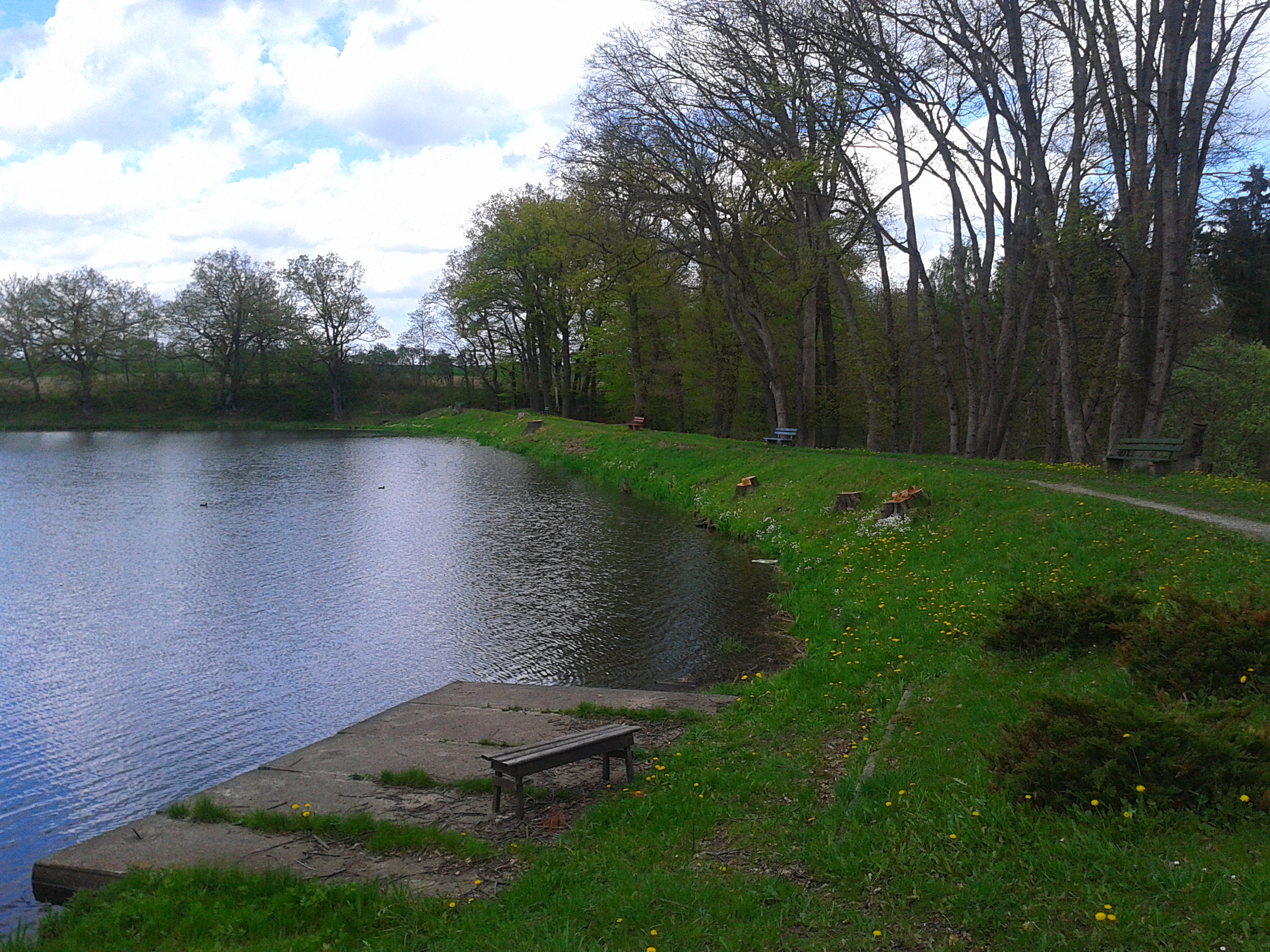 wasserseitiger Teichdamm des Kunstteichs Neudorf